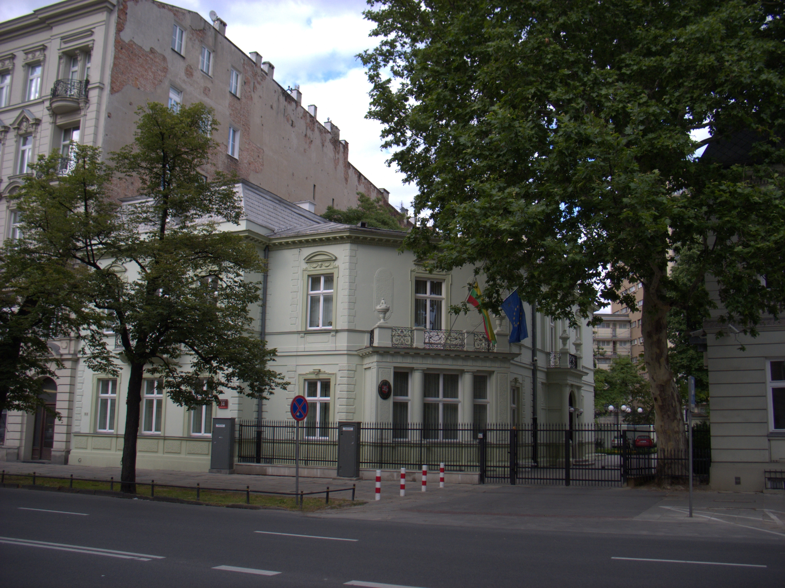 Pałac pod Karczochem w Warszawie